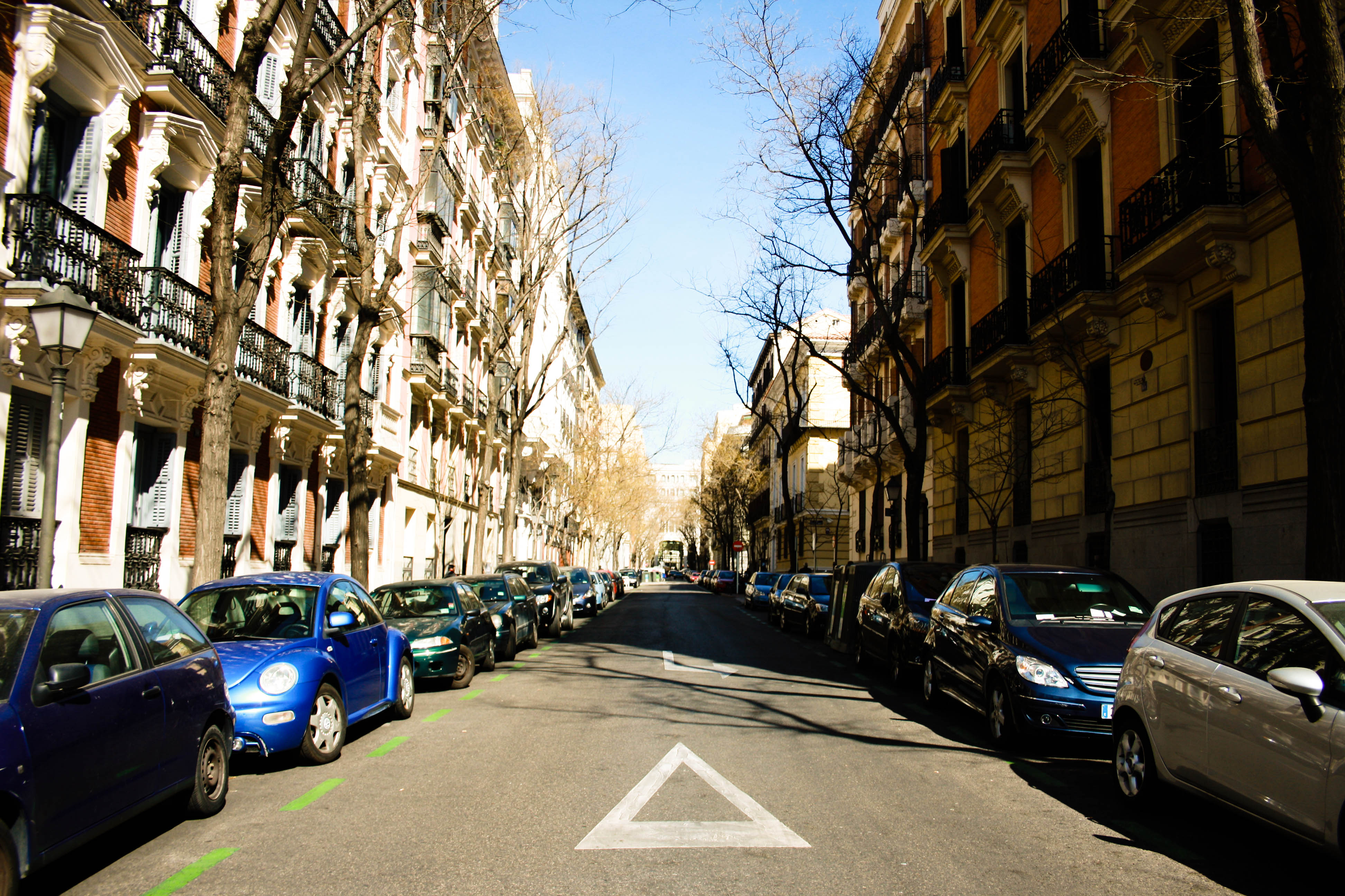 Madrid Streets